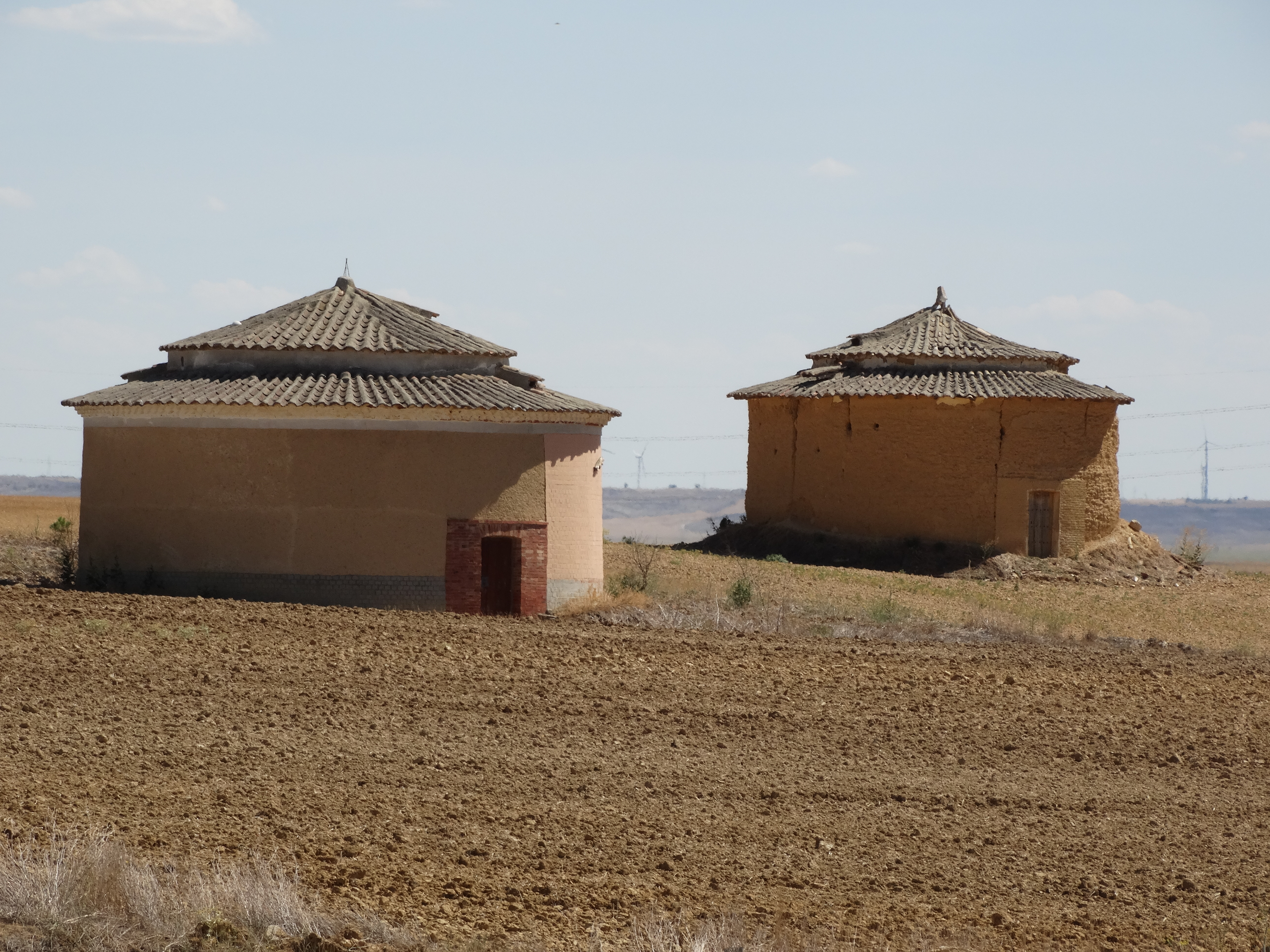 Castromocho, provincia de Palencia (España). Palomares.